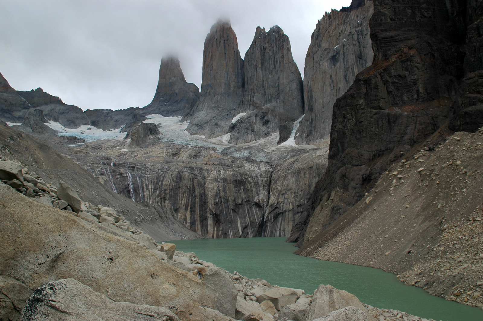 Torres del Paine Mountains, Torres del Paine National Park, Chile.